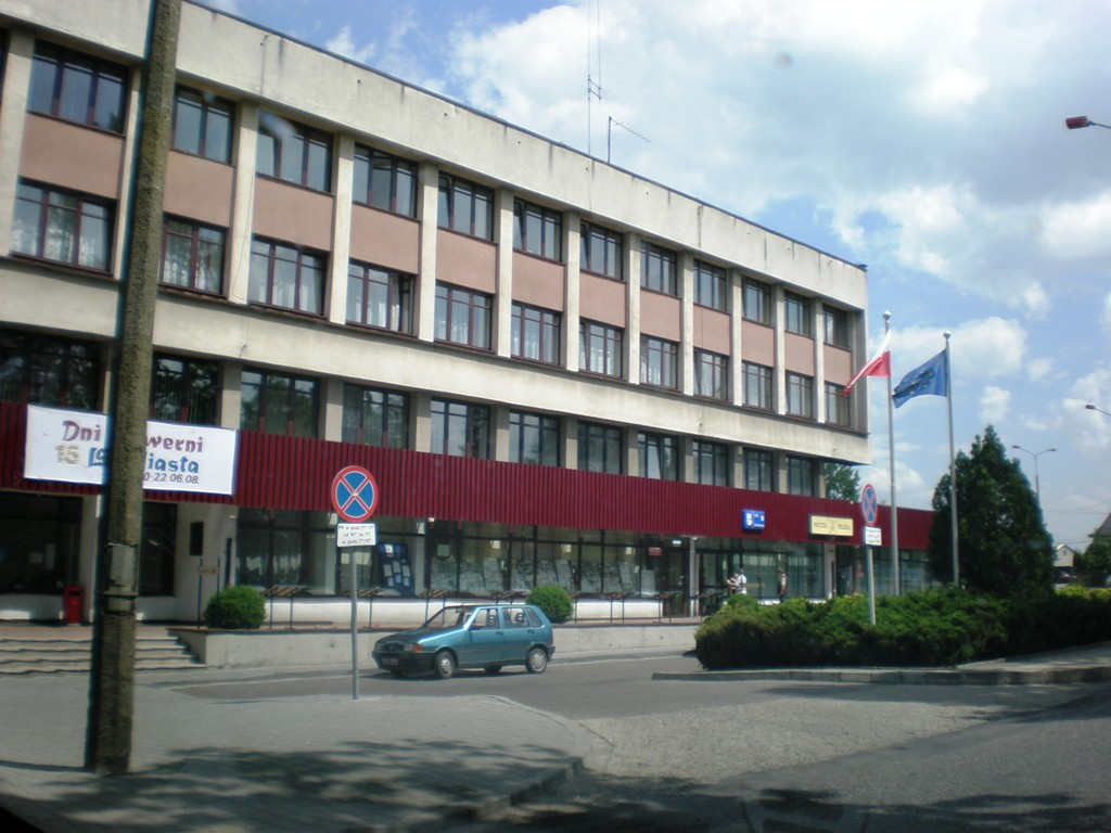 Urząd Miejski w Alwernia